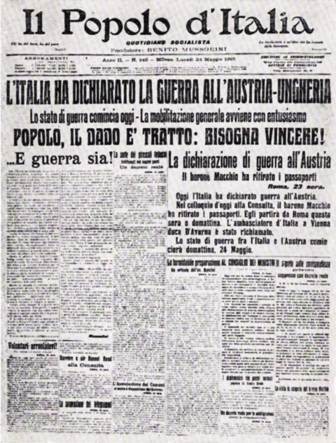 Prima pagina Popolo d'Italia 24 maggio 1915